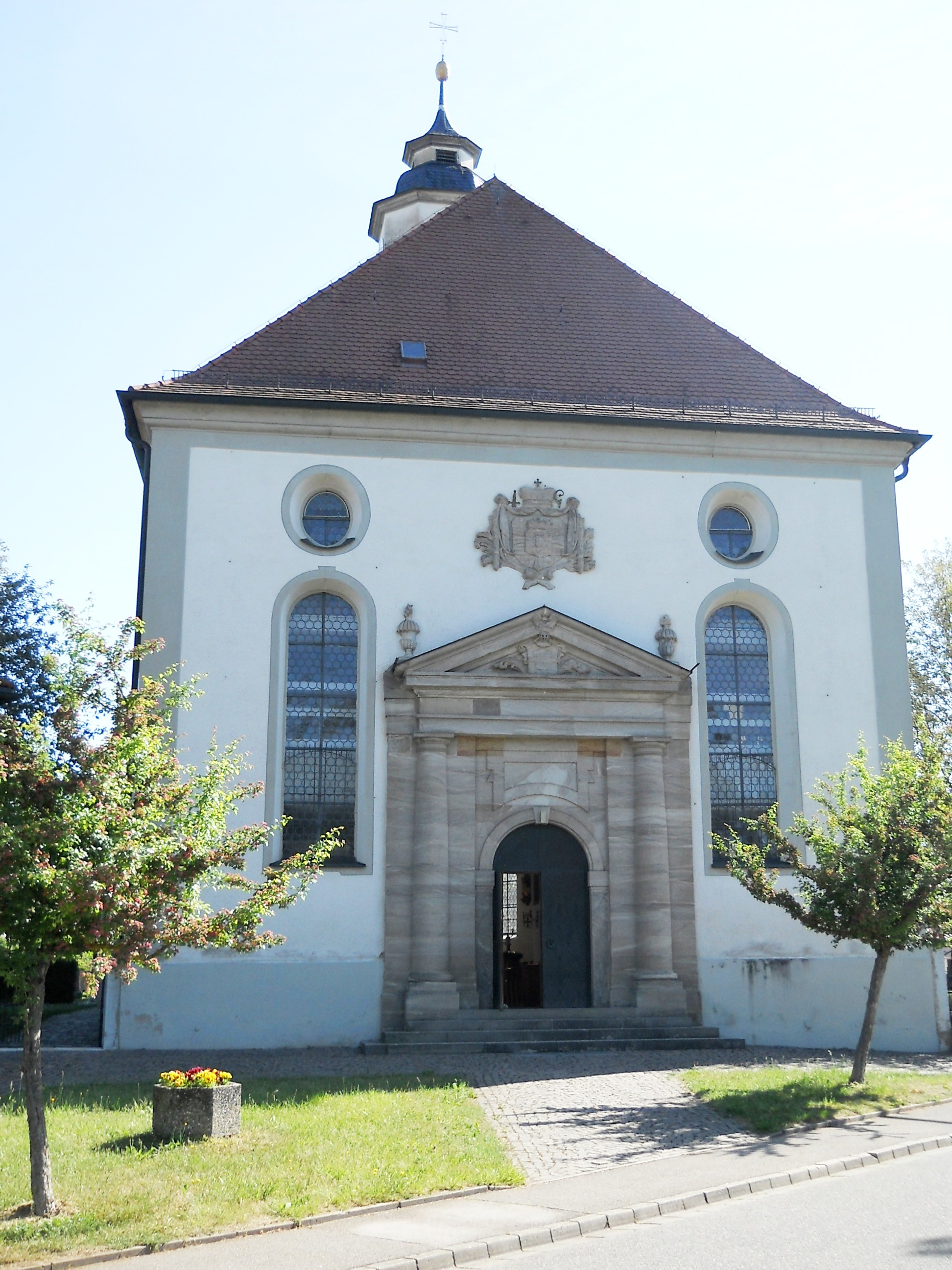 St. Veit, Ortsteil von Pleinfeld im Landkreis Weißenburg-Gunzenhausen (Bayern), Kath. Pfarrkirche St. Vitus